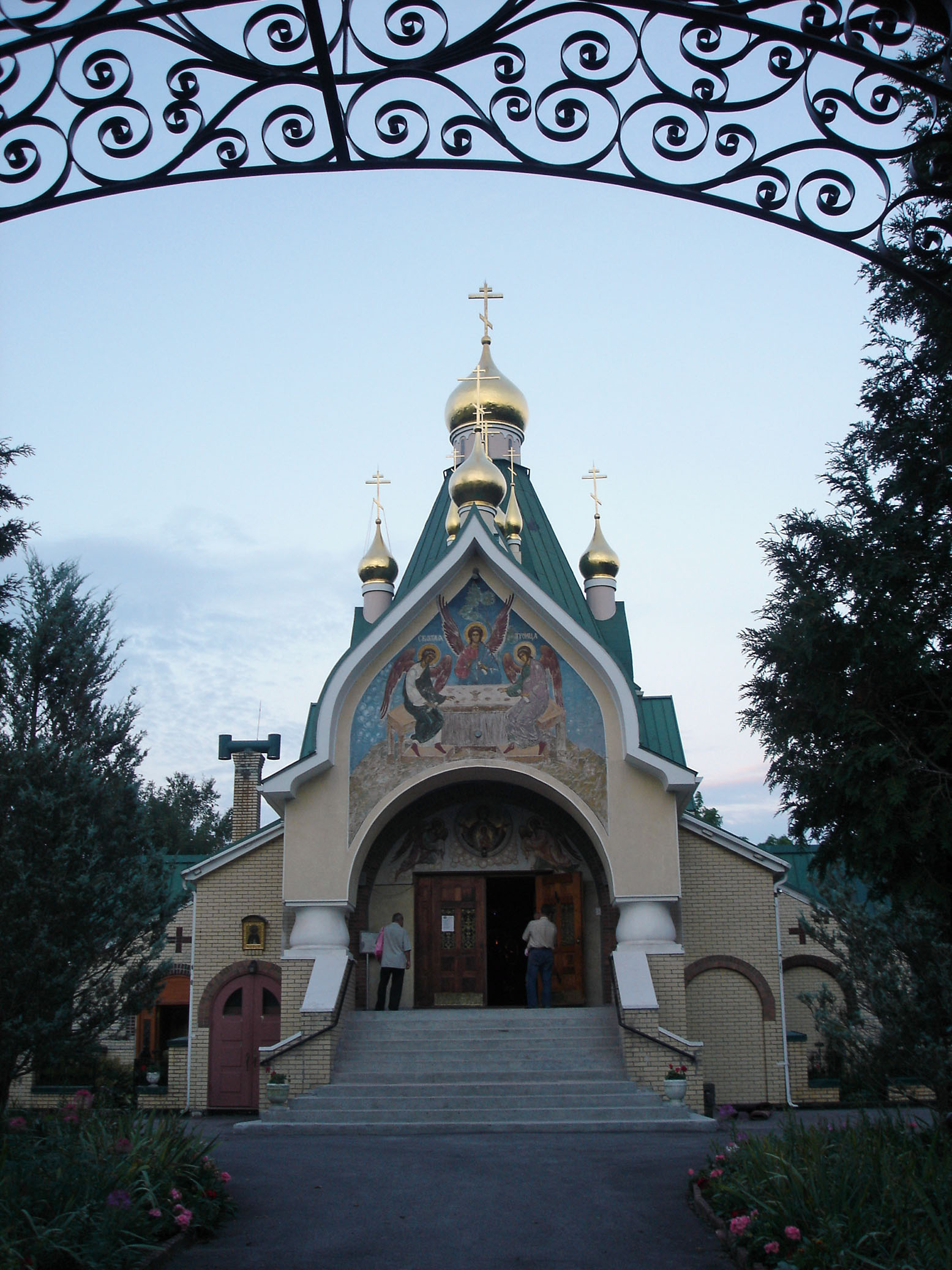 2010-08-15 trip to Jordanville 034